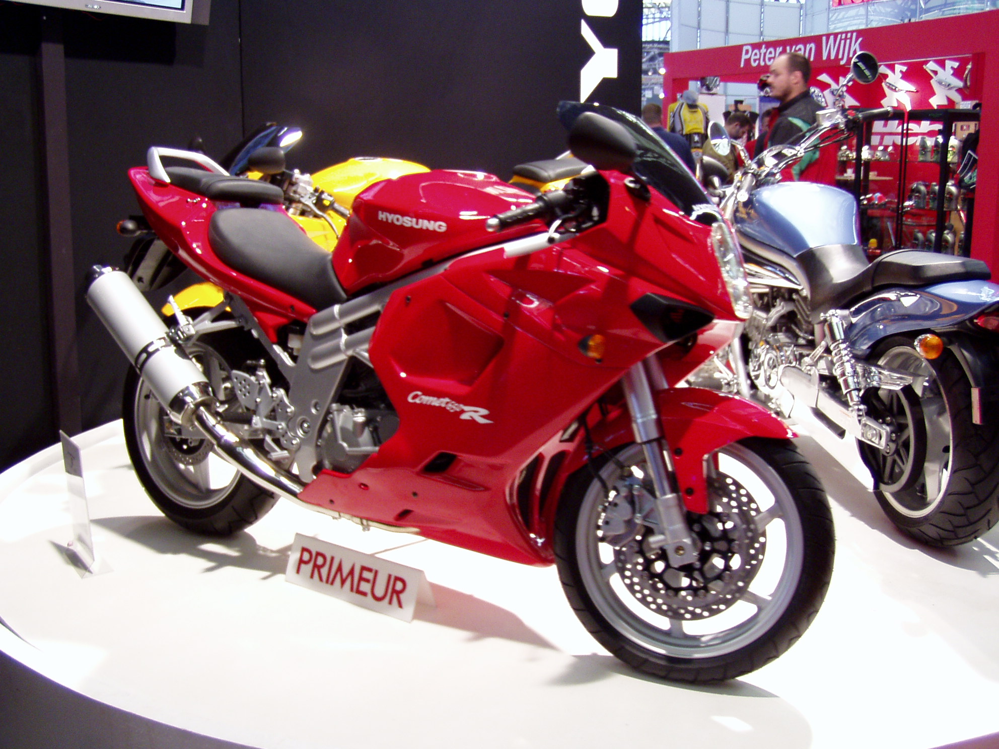 Toestemming van Tom Smeets ((PD))